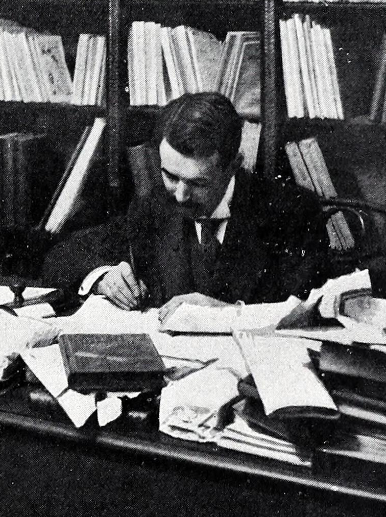 Luis Royo y Villanova.